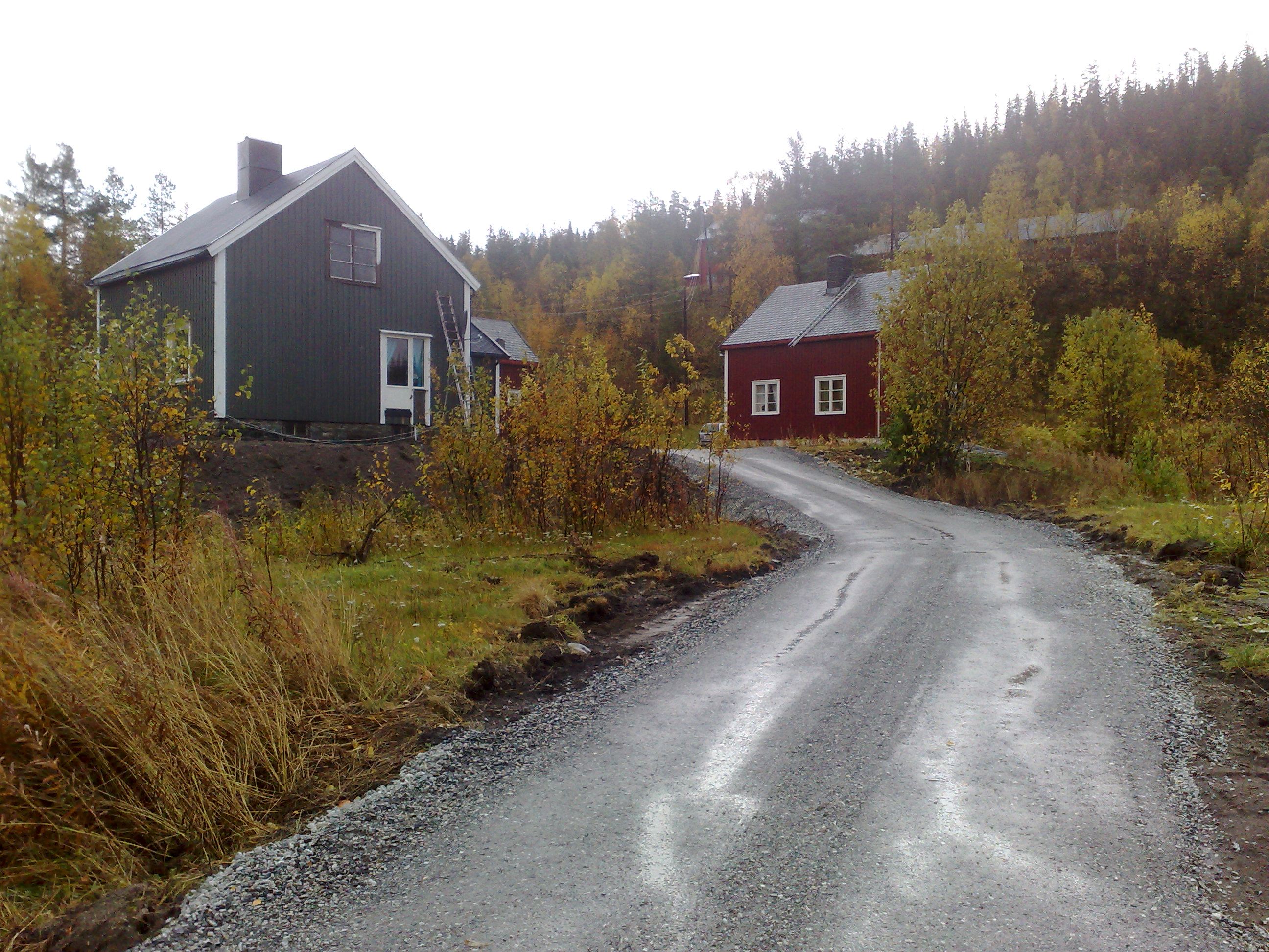 Bilde av jernbanevokter boligene på Brekkvasselv/Namsskogan/Nord-Trøndelag